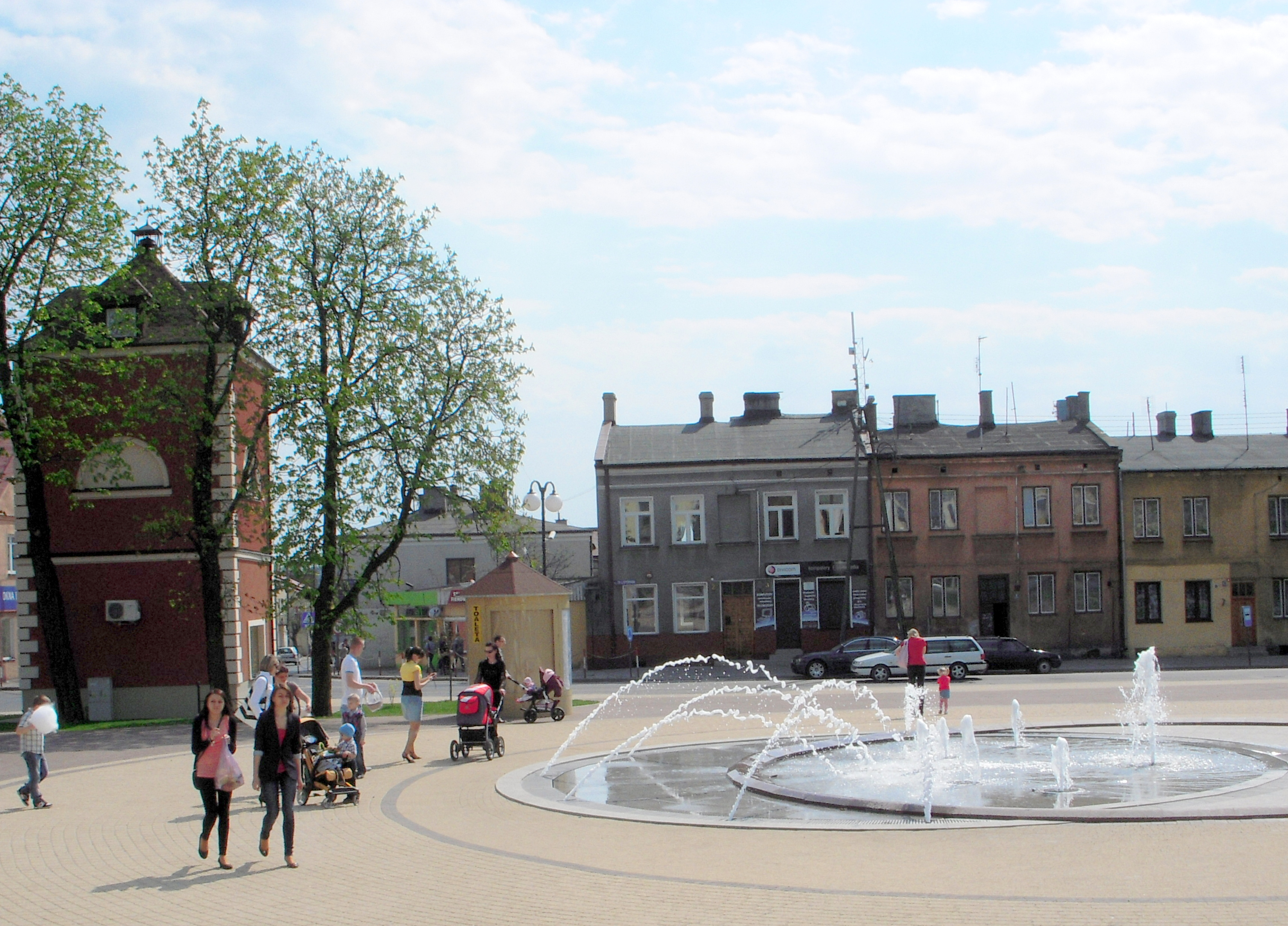 Centrum Miasta Żychlin